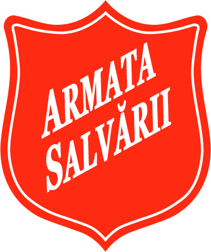 Logo-ul Armatei din Romania